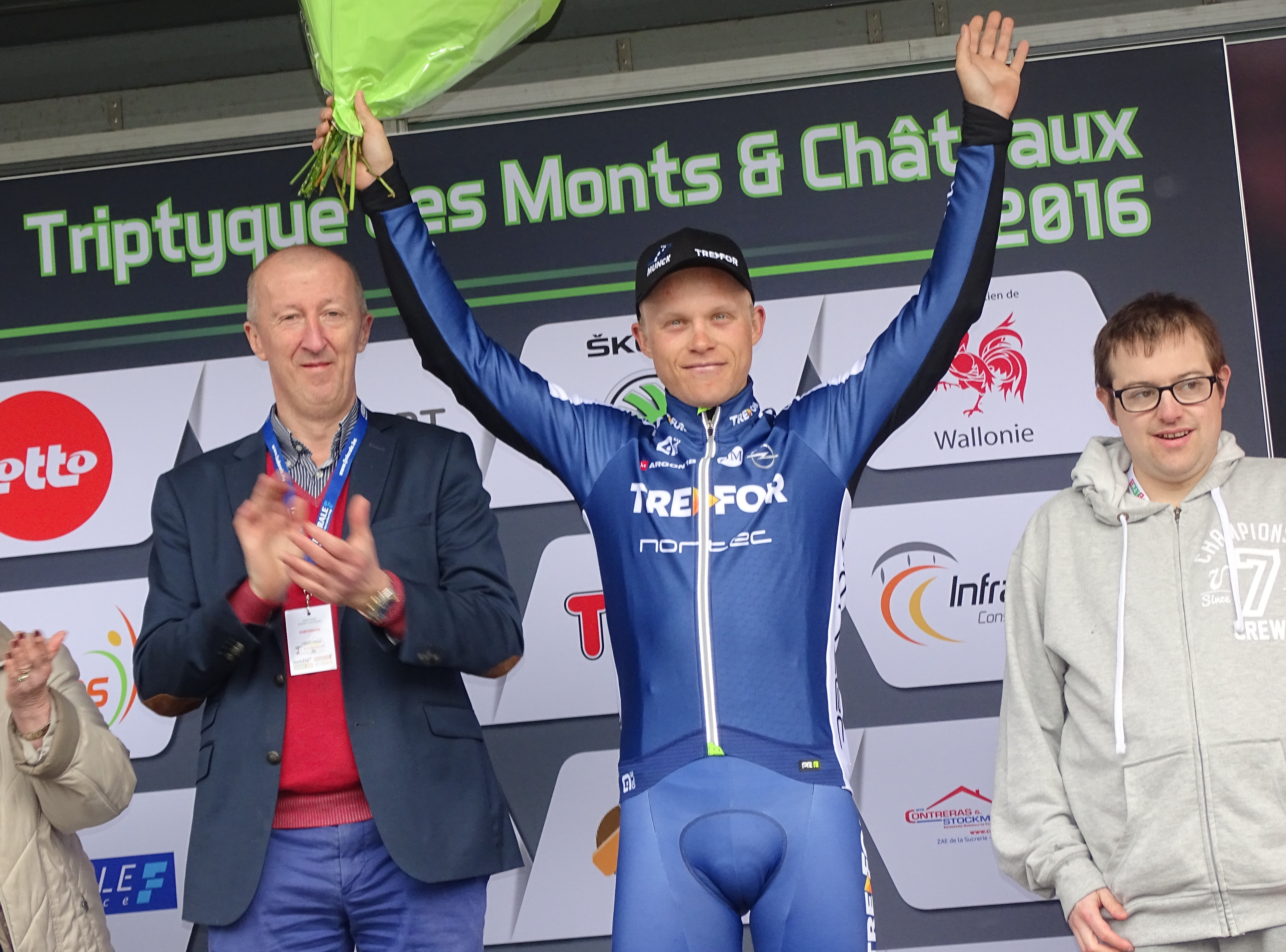 Triptyque des Monts et Châteaux 2016